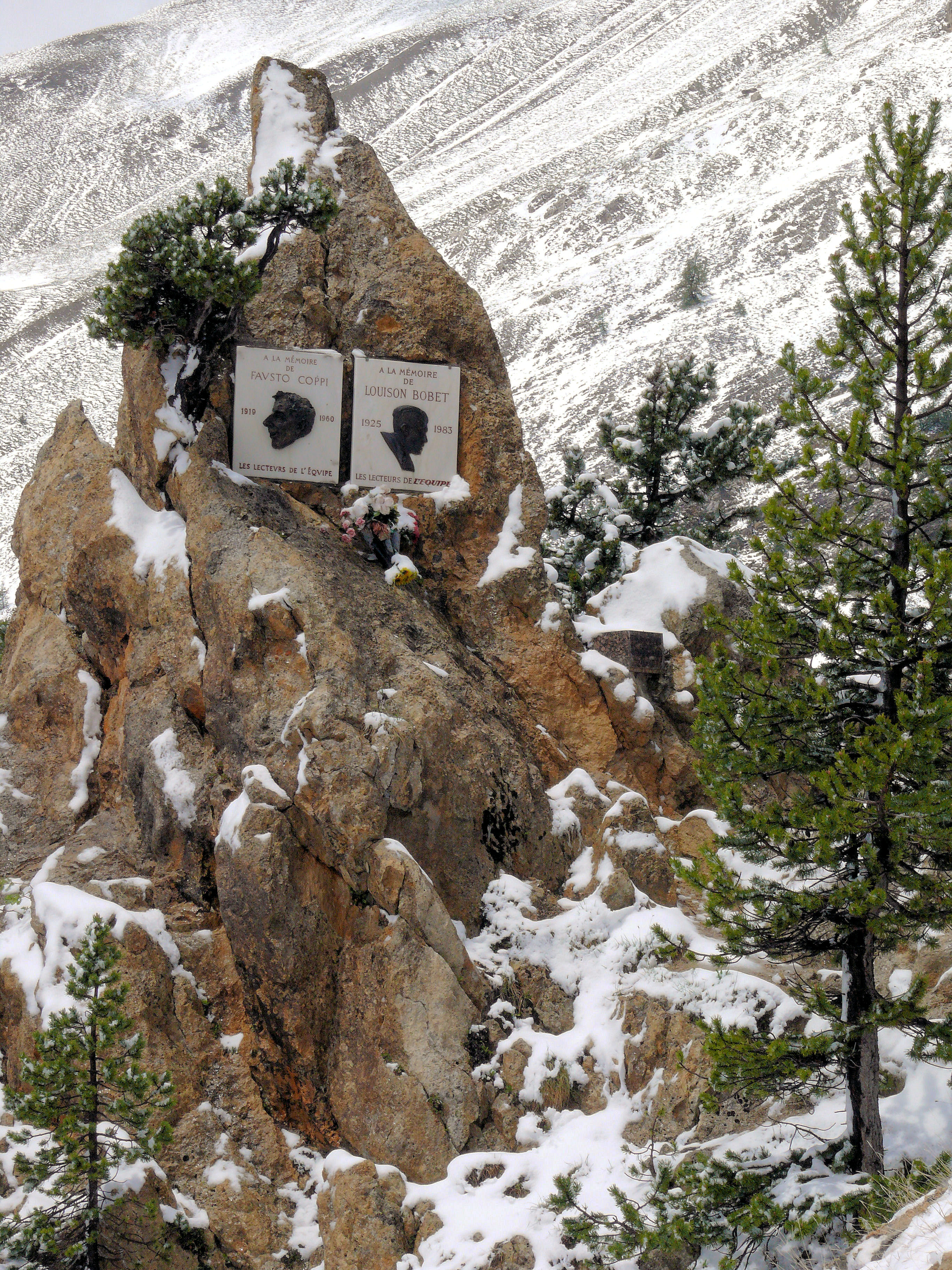 Arvieux - Monument à la mémoire de Fausto Coppi et Louison Bobet sur la route du col d'Izoard